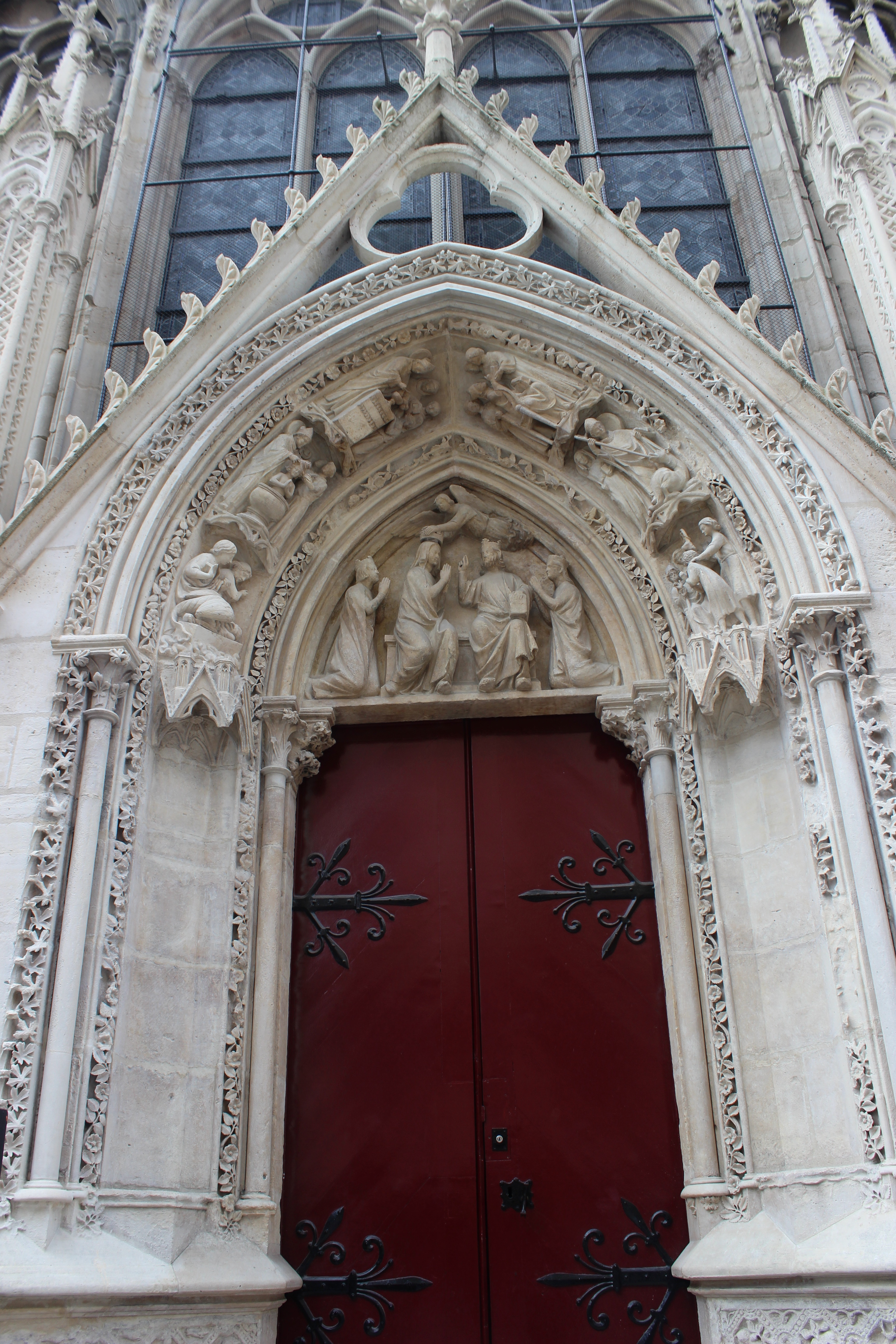 París. Notre Dame. Puerta roja.